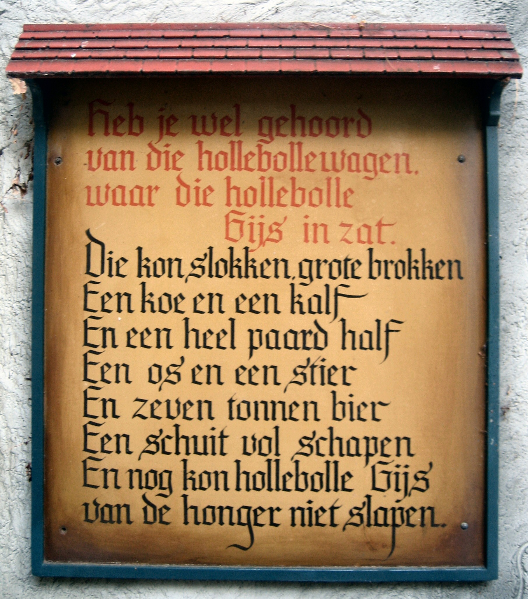 Holle Bolle Gijs De Efteling Kaatsheuvel The Netherlands Picture taken by Hullie - July 2006